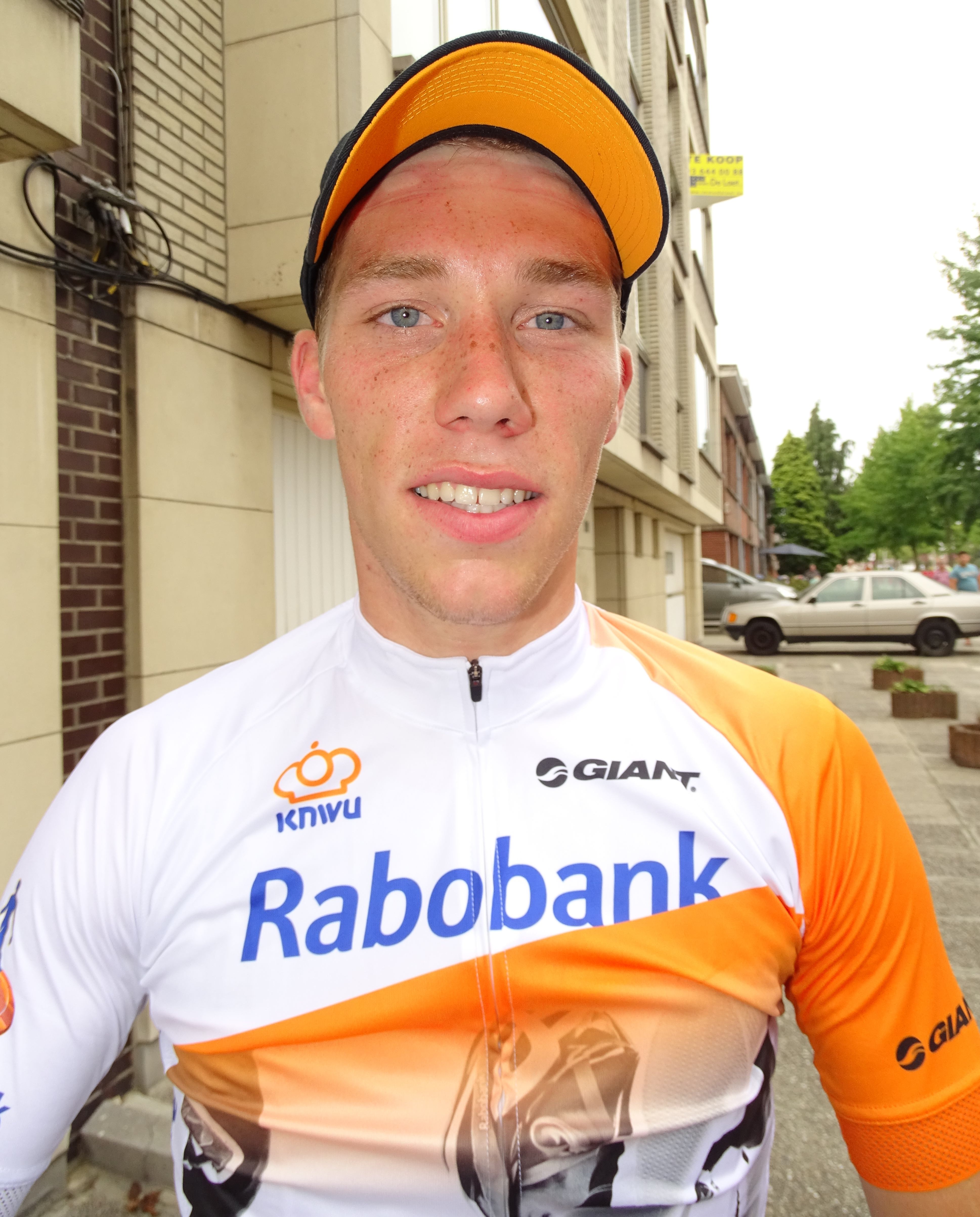 Reportage réalisé le dimanche 9 août à l'occasion de l'arrivée de la Flèche du port d'Anvers 2015 à Merksem (Anvers), Belgique.